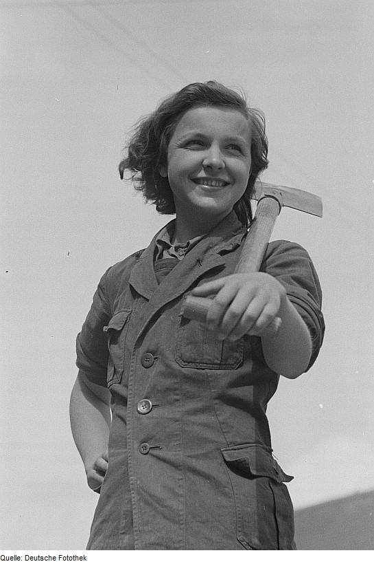 Original image description from the Deutsche FotothekAufbauhelferin am "Sportforum"